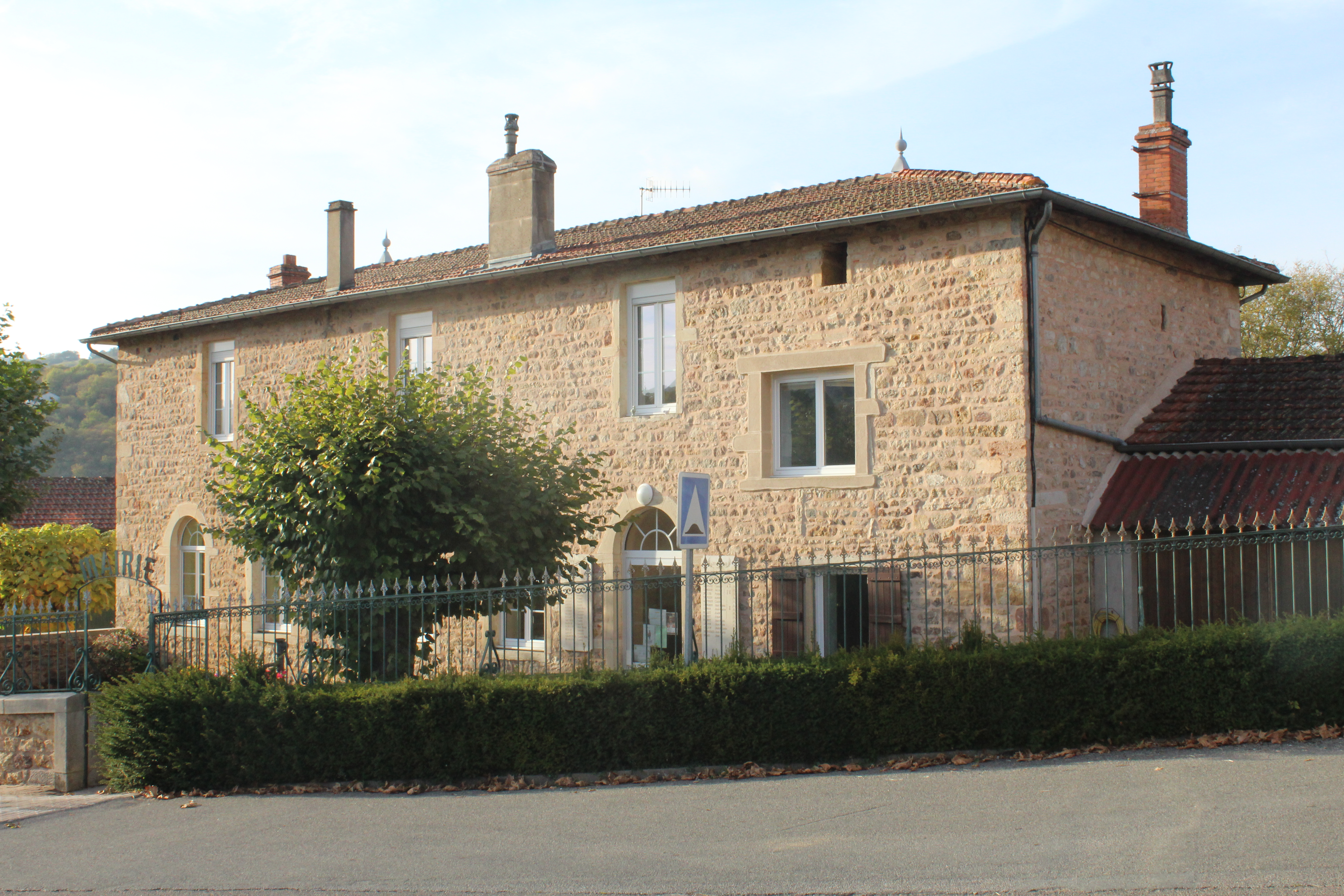 Mairie de Serrières, Saône-et-Loire.